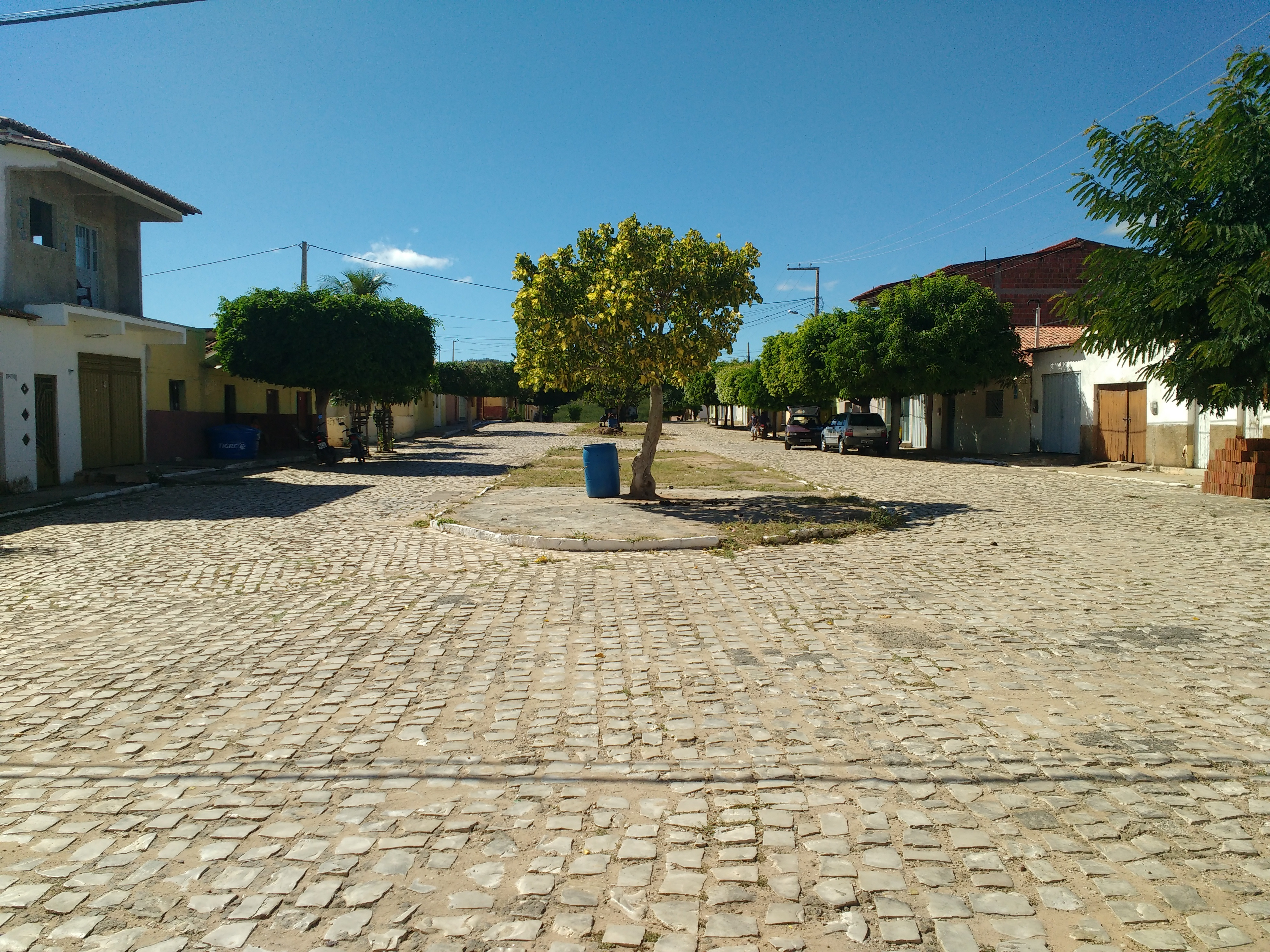 Rua Benjamin Constant, na divisa entre os municípios de Paraná (Rio Grande do Norte) e Uiraúna (Paraíba), Brasil.